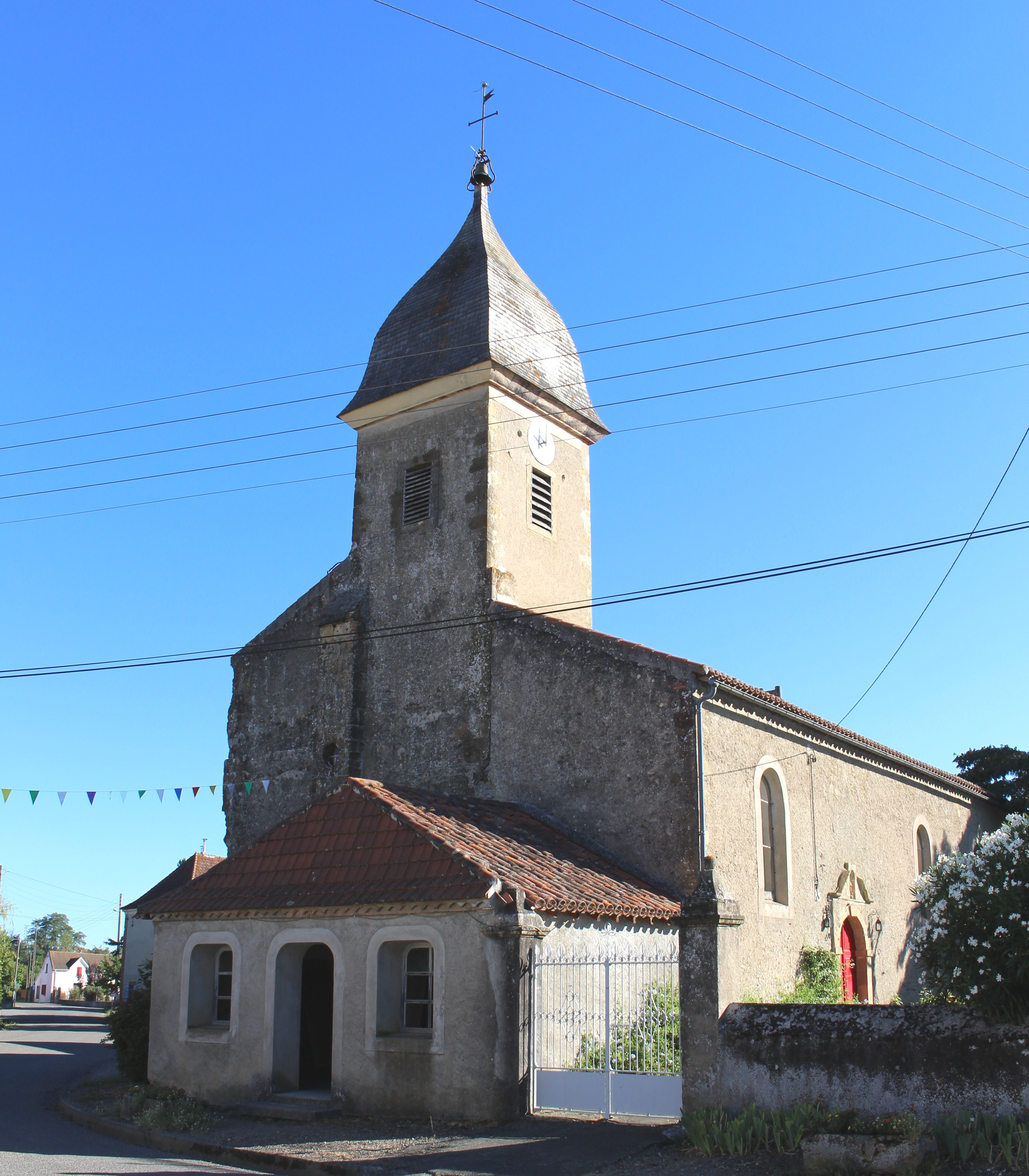 Église Saint-Jean-Baptiste de Hères (Hautes-Pyrénées)